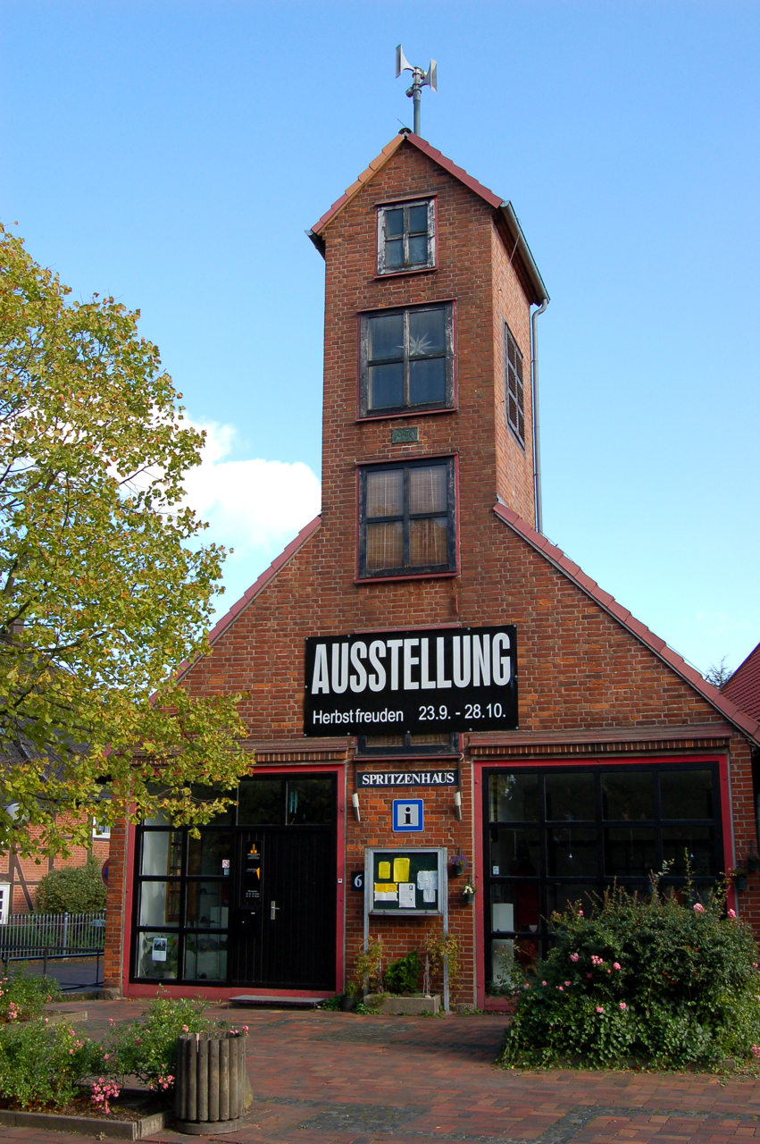 Spritzenhaus in Wennigsen mit kunsthanderwerklichen Ateliers.